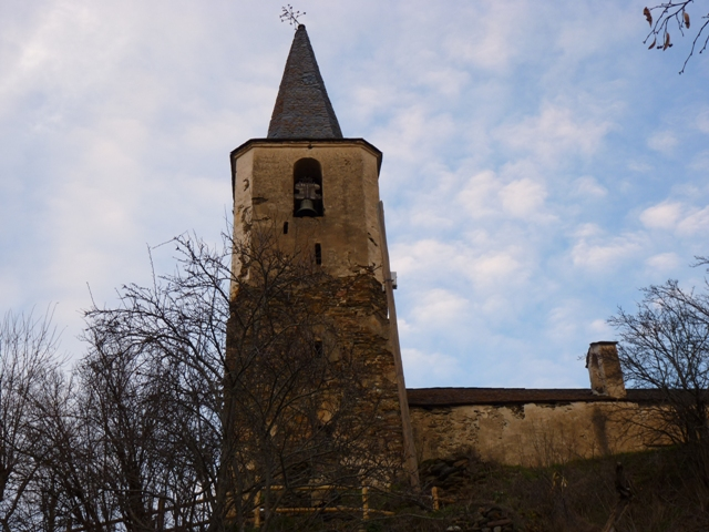 Església al poble d'Unarre (Pallars Sobirà)